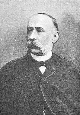 "M. Joseph Jourdan, né à Fréjus [sic]. Phot. Camille Brion, à Marseille".